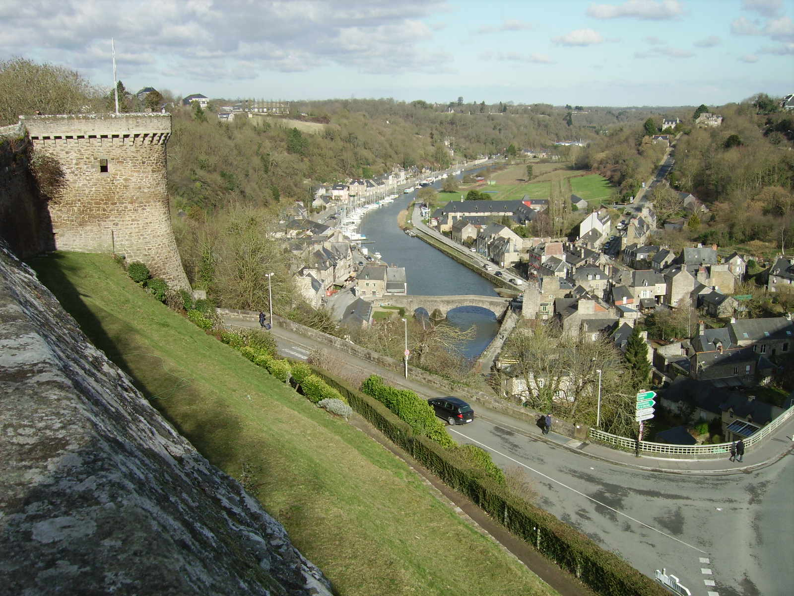 Panoramo de Dinan de la Turo Sankta Katerina